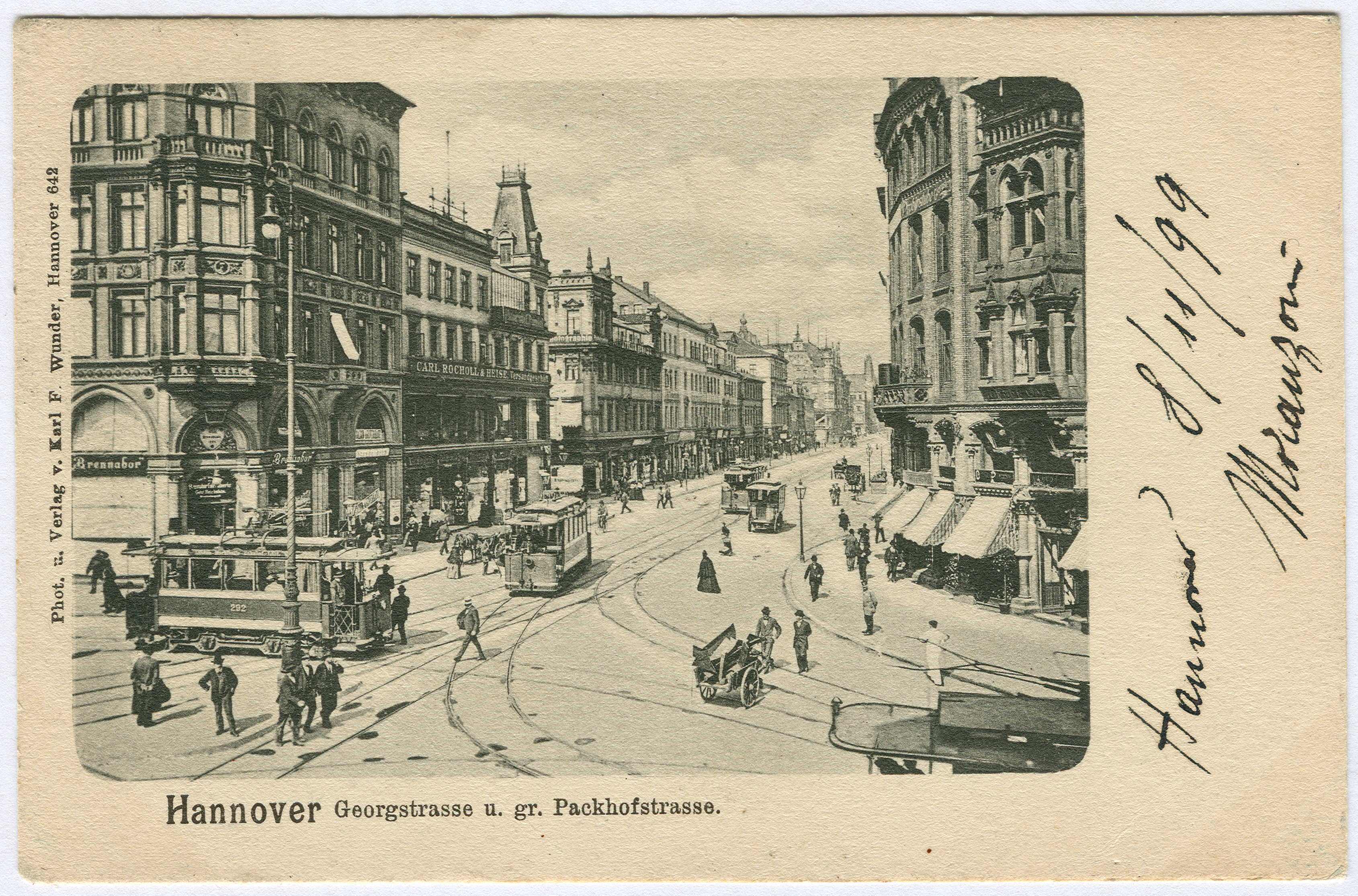 Georgstraße und Große Packhofstraße mit elektrischen Straßenbahnen